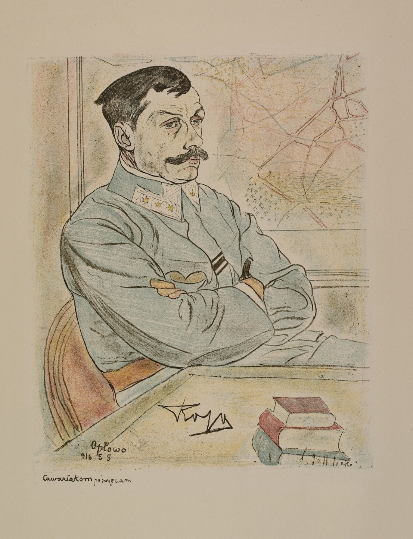 Bolesław Roja Lithography.